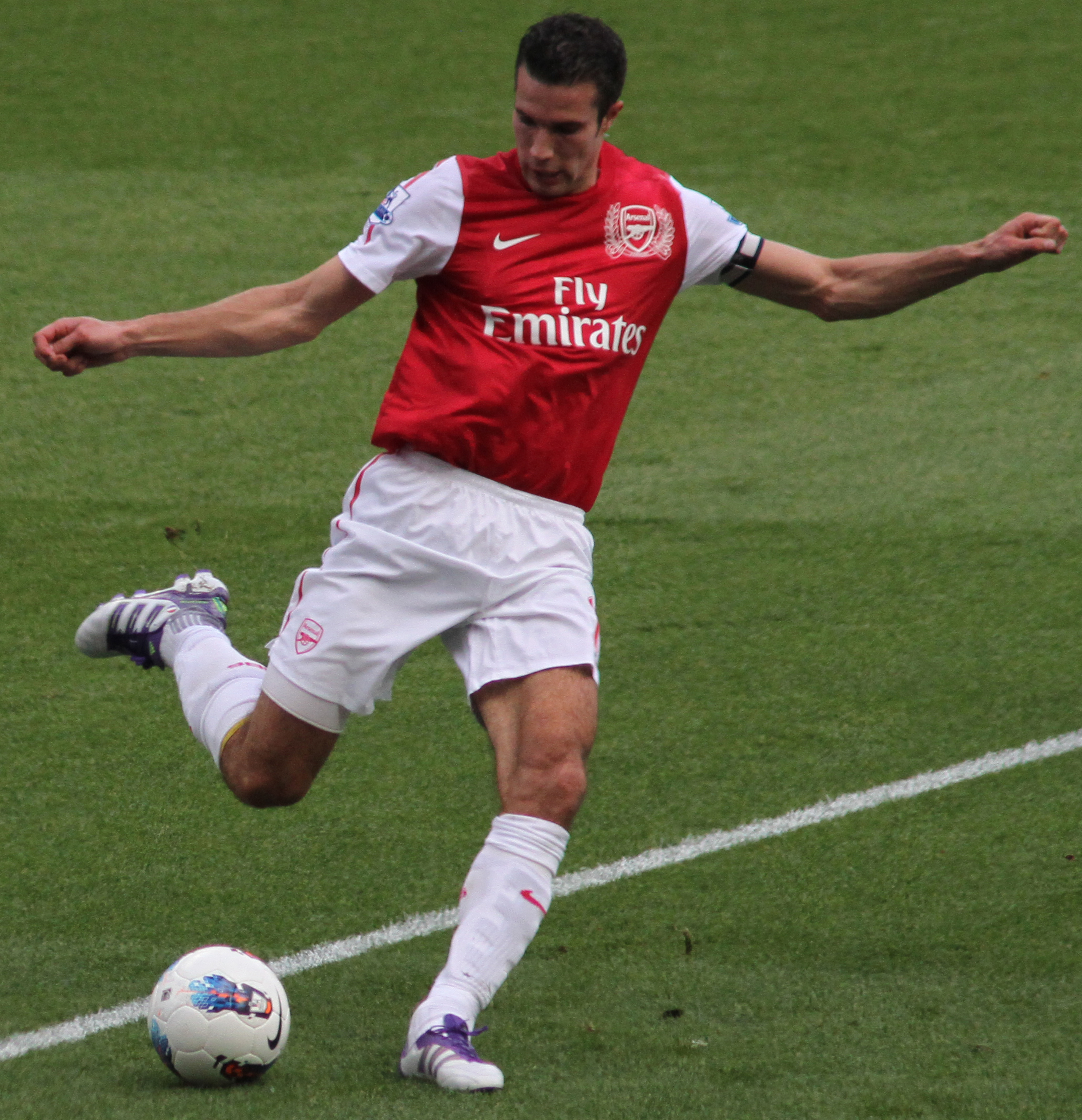 Robin van Persie of Arsenal, vs Swansea, September 10, 2011.